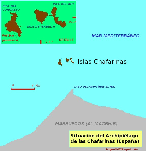 made by myself